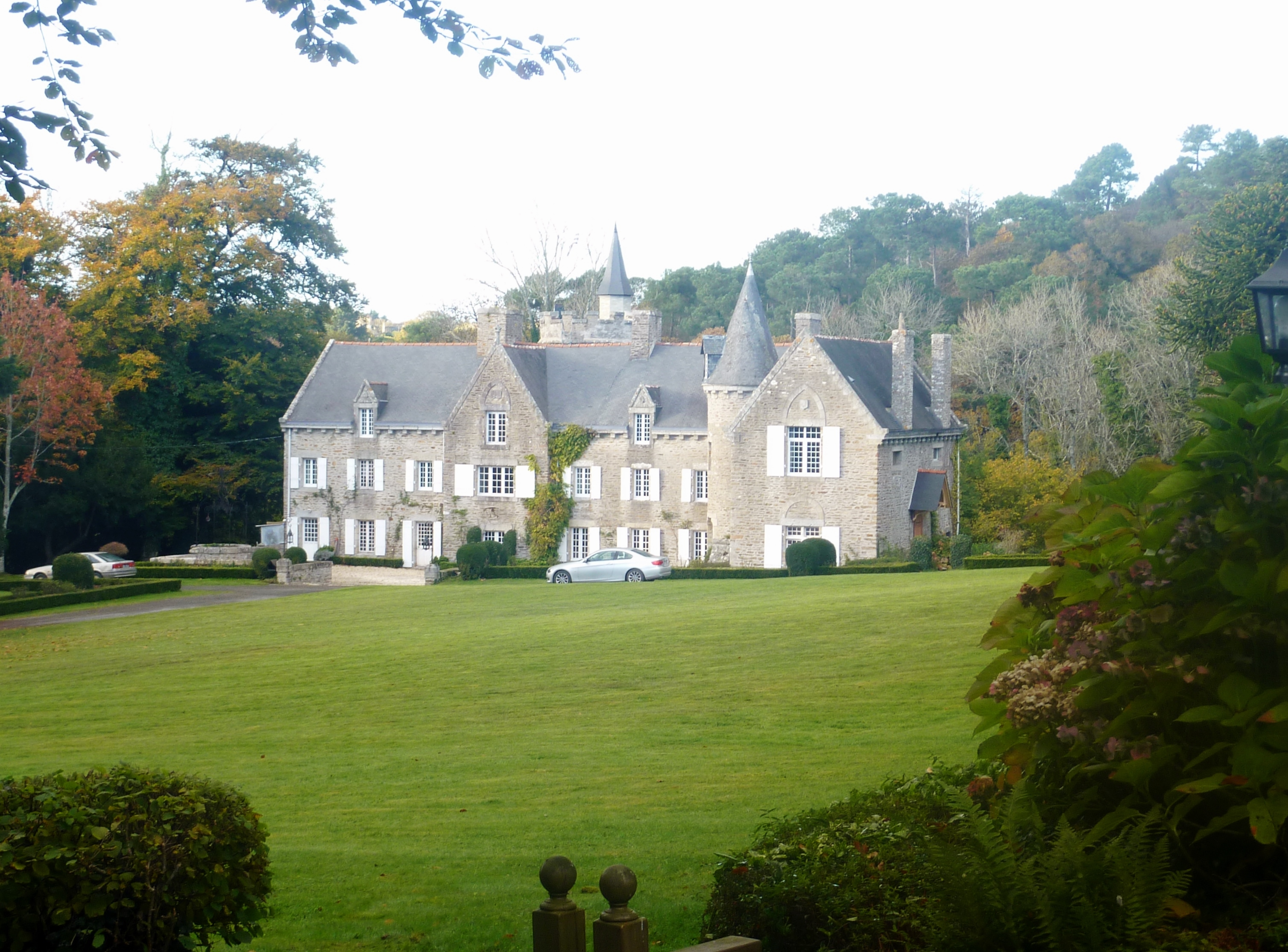 Le manoir de Kertalg, un "château-hôtel" en bordure du ruisseau du Guilly, au fond de l'anse de la Rivière de Belon